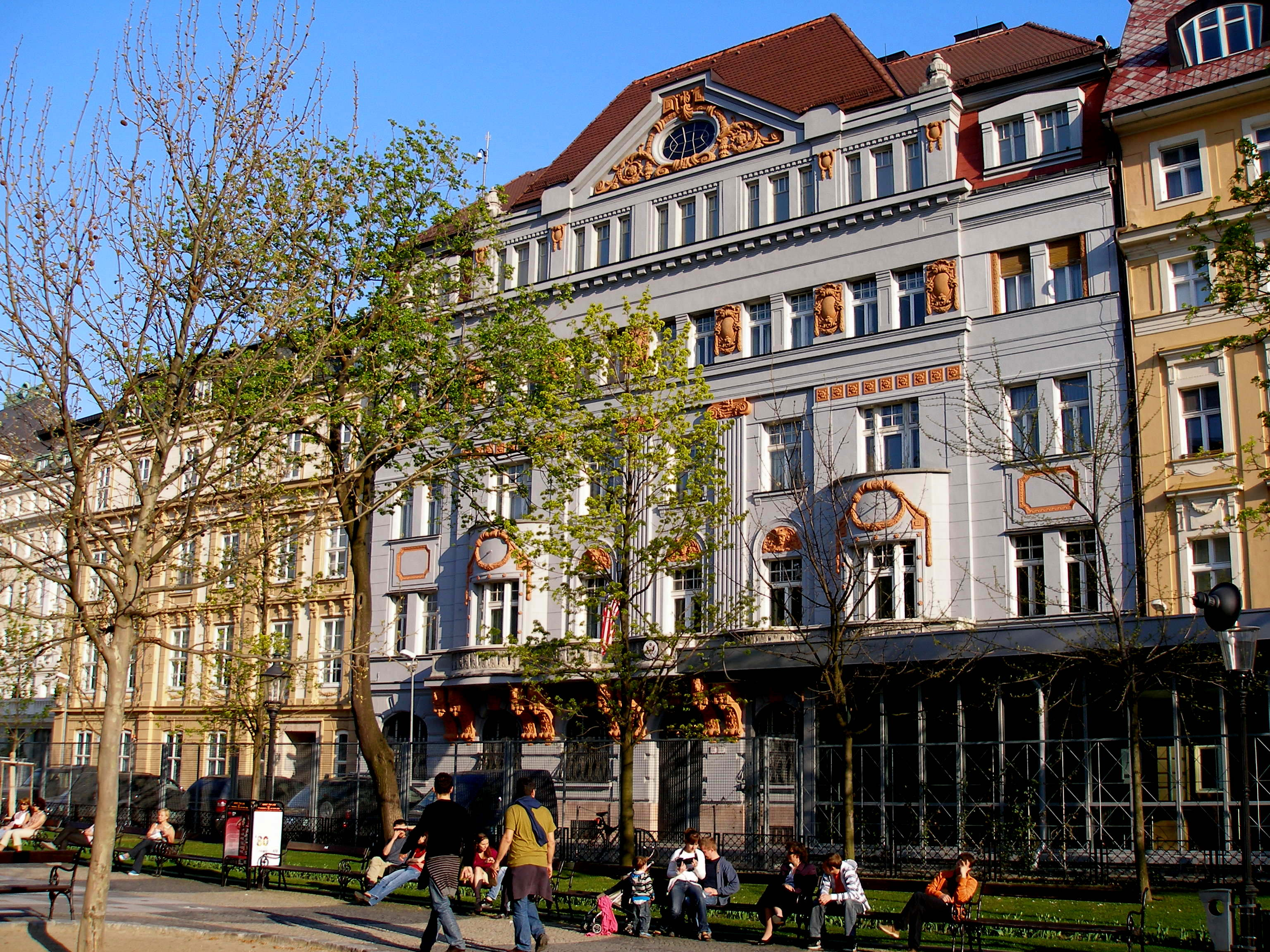 Budova veľvyslanectva USA v Bratislave a priľahlé okolie na veľkonočný Veľký piatok 2009